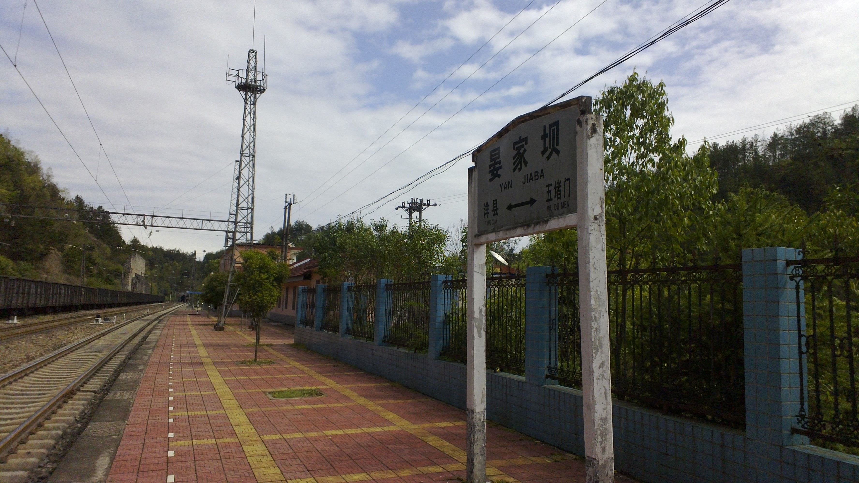 陽安鐵路（晏家壩站）2015年4月4日拍攝，天氣晴，鏡頭朝向陽平關。